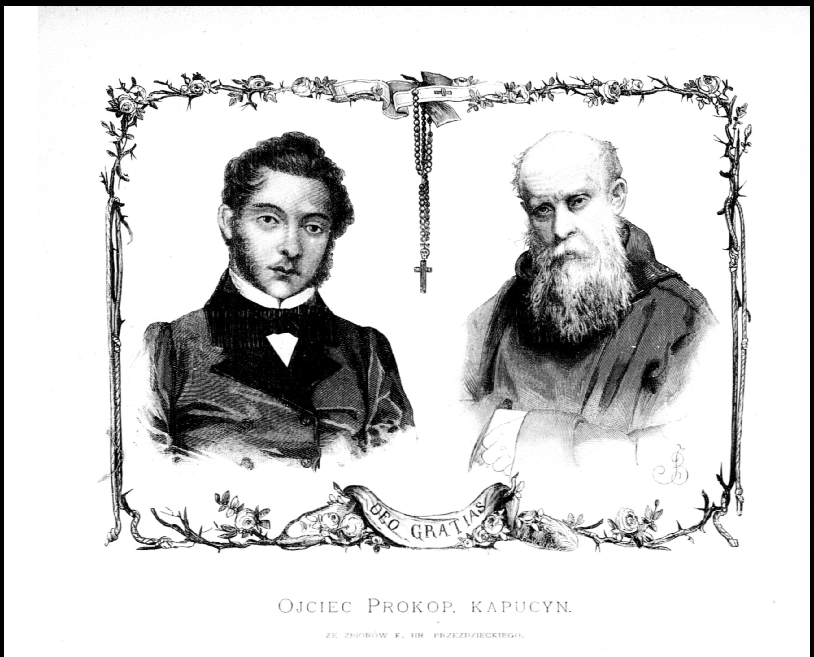 anonimowy rysunek